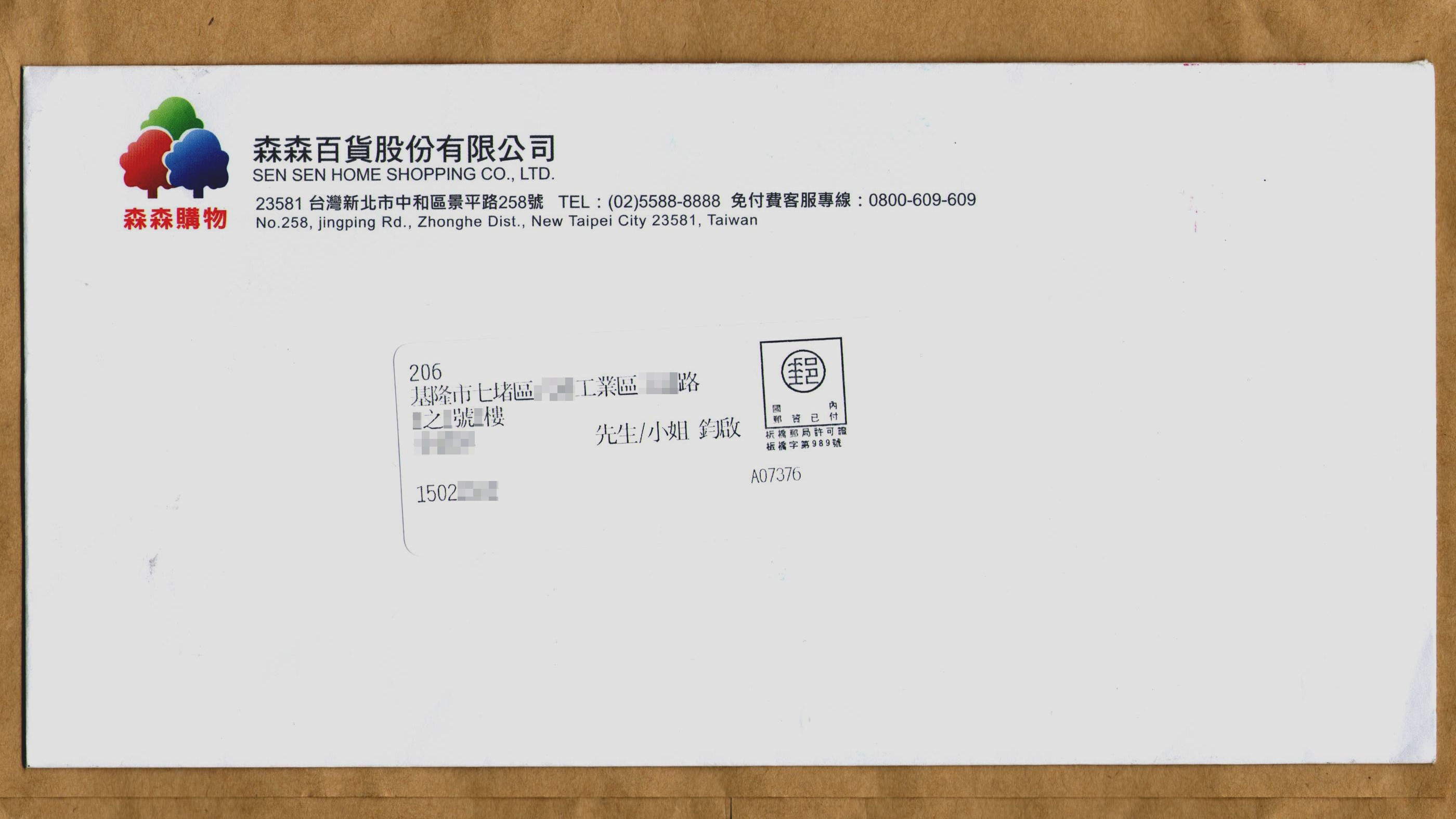 中文（台灣）: 森森百貨信封正面。